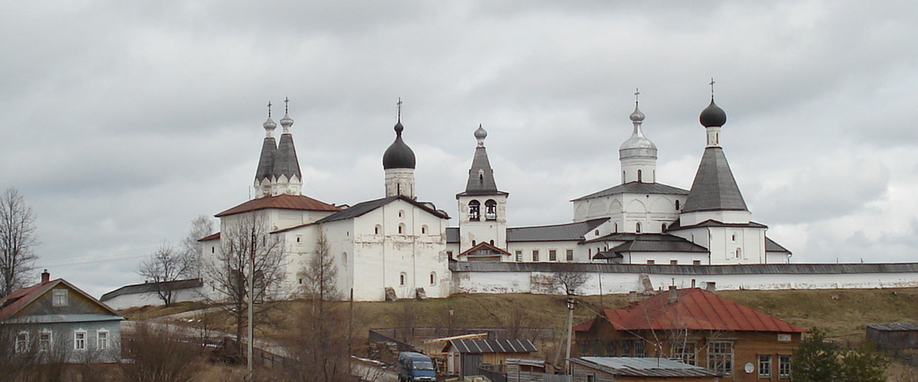 Ferapontov Monastery